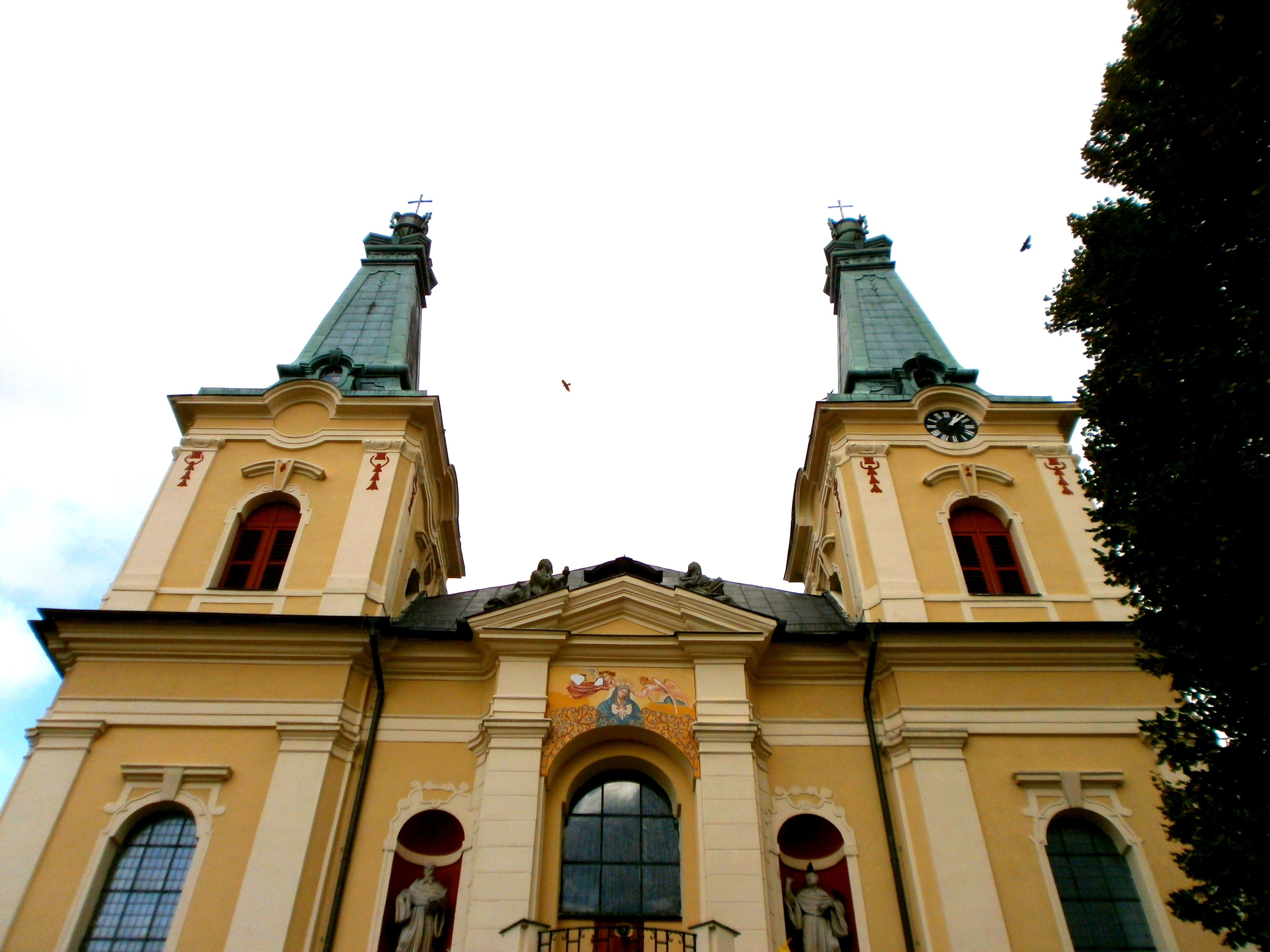 Rokitno, Sanktuarium Matki Bożej Cierpliwie Słuchającej